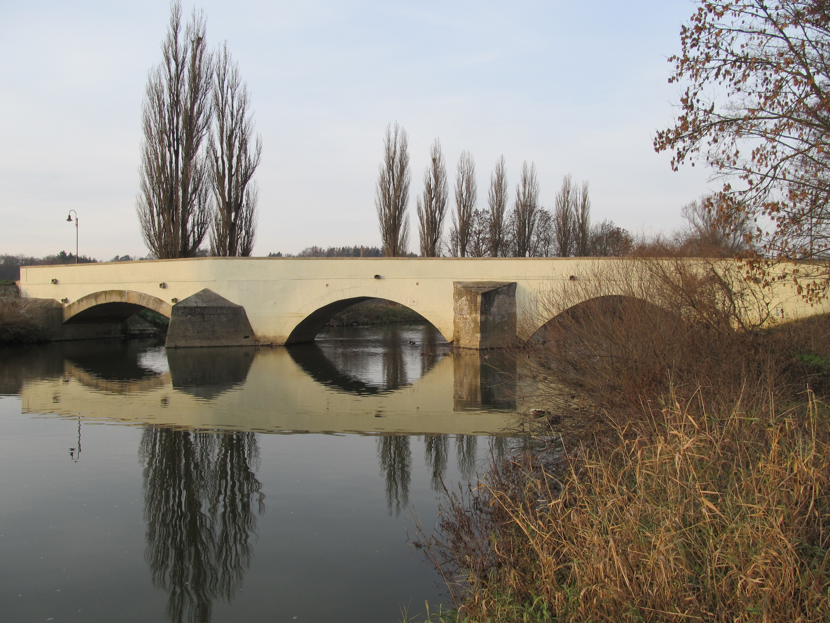 Dobřany - historický most přes Radbuzu